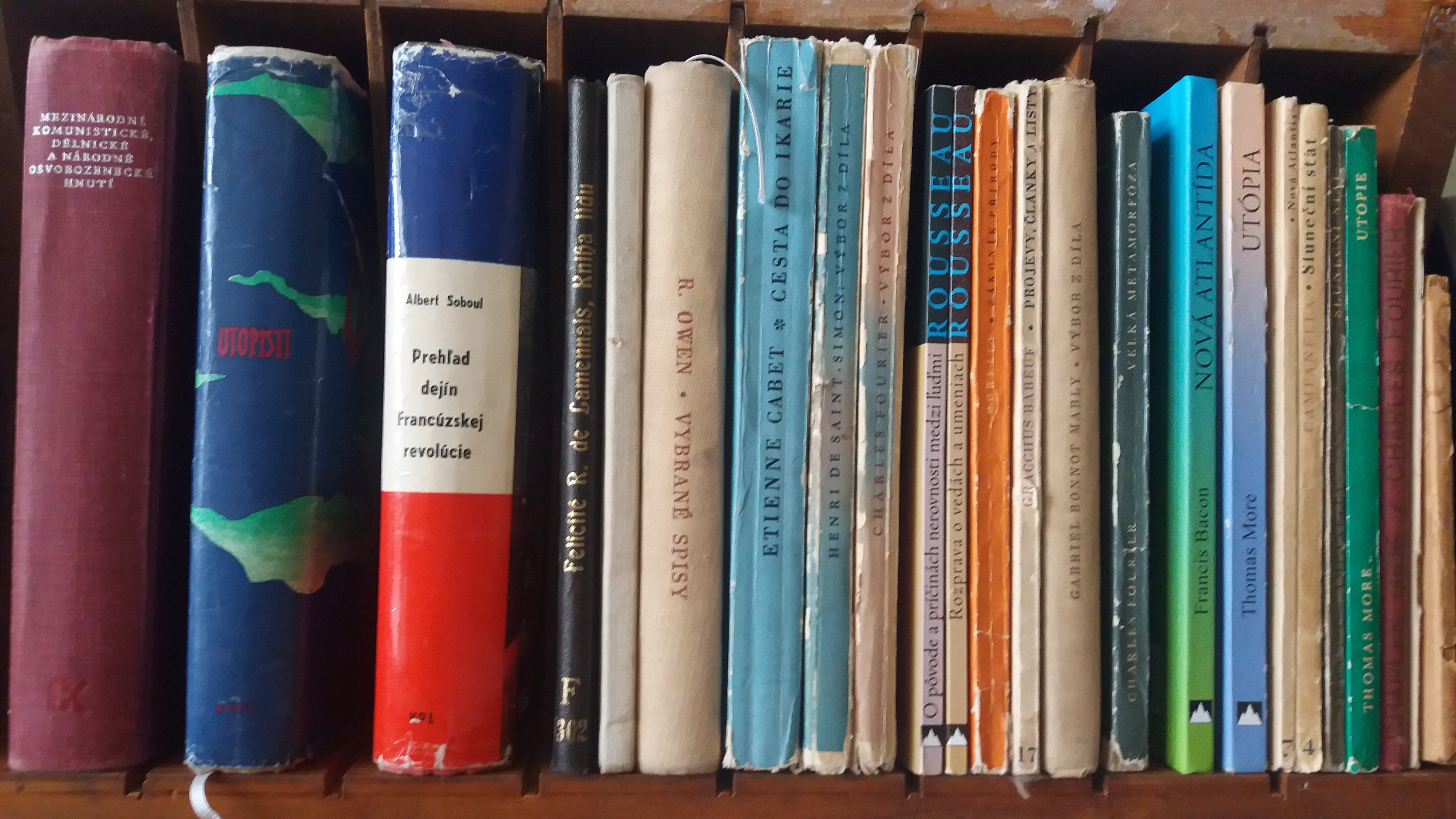 České a slovenské preklady diel utopistov